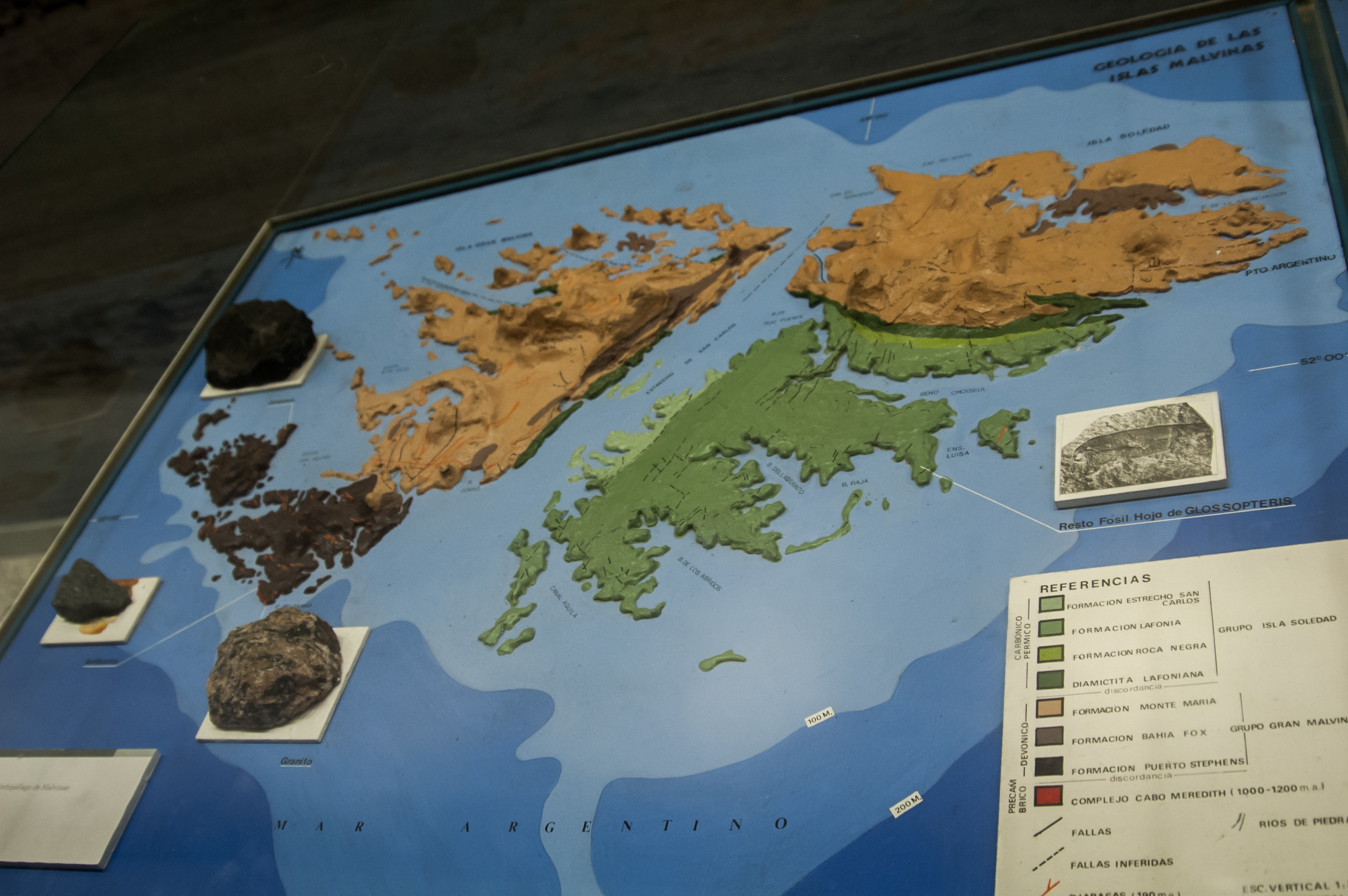 museo malvinas 024 relieve